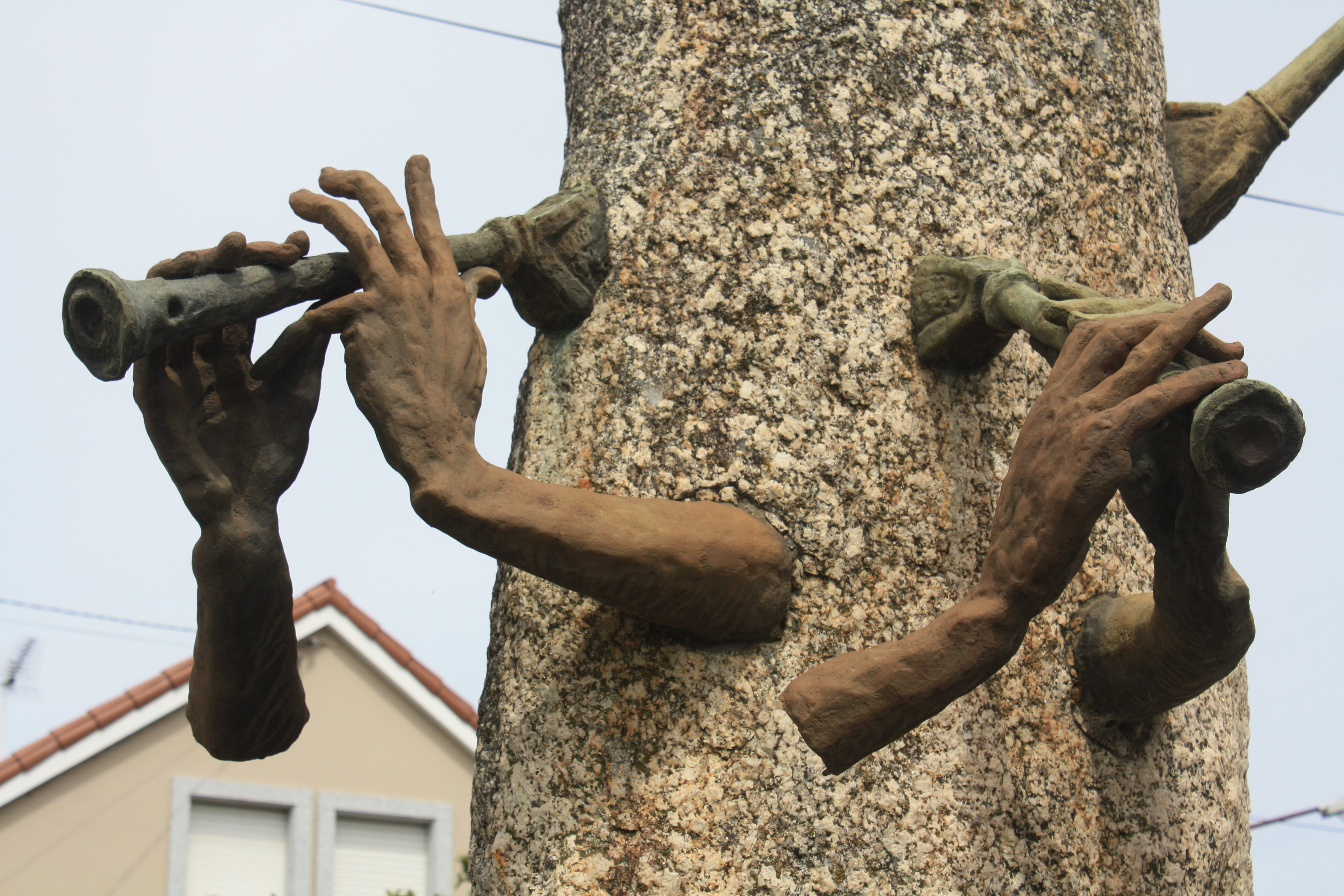 Monumento erixido en 1982 a “Os Campaneiros” de Vilagarcía, grupo de gaiteiros que tocou entre 1926 e 1984. O monumento está no lugar do Sisto, na parroquia de Solobeira (Vilagarcía de Arousa)